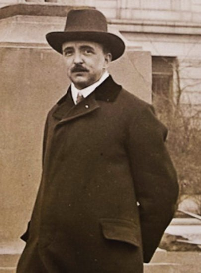 Vojtěch Preissig (1873 - 1944), Český grafik, typograf, malíř a ilustrátor.